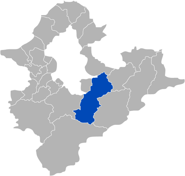 KaurJmeb為編輯中華民國臺灣省臺北縣石碇鄉，於2005年2月7日所繪。